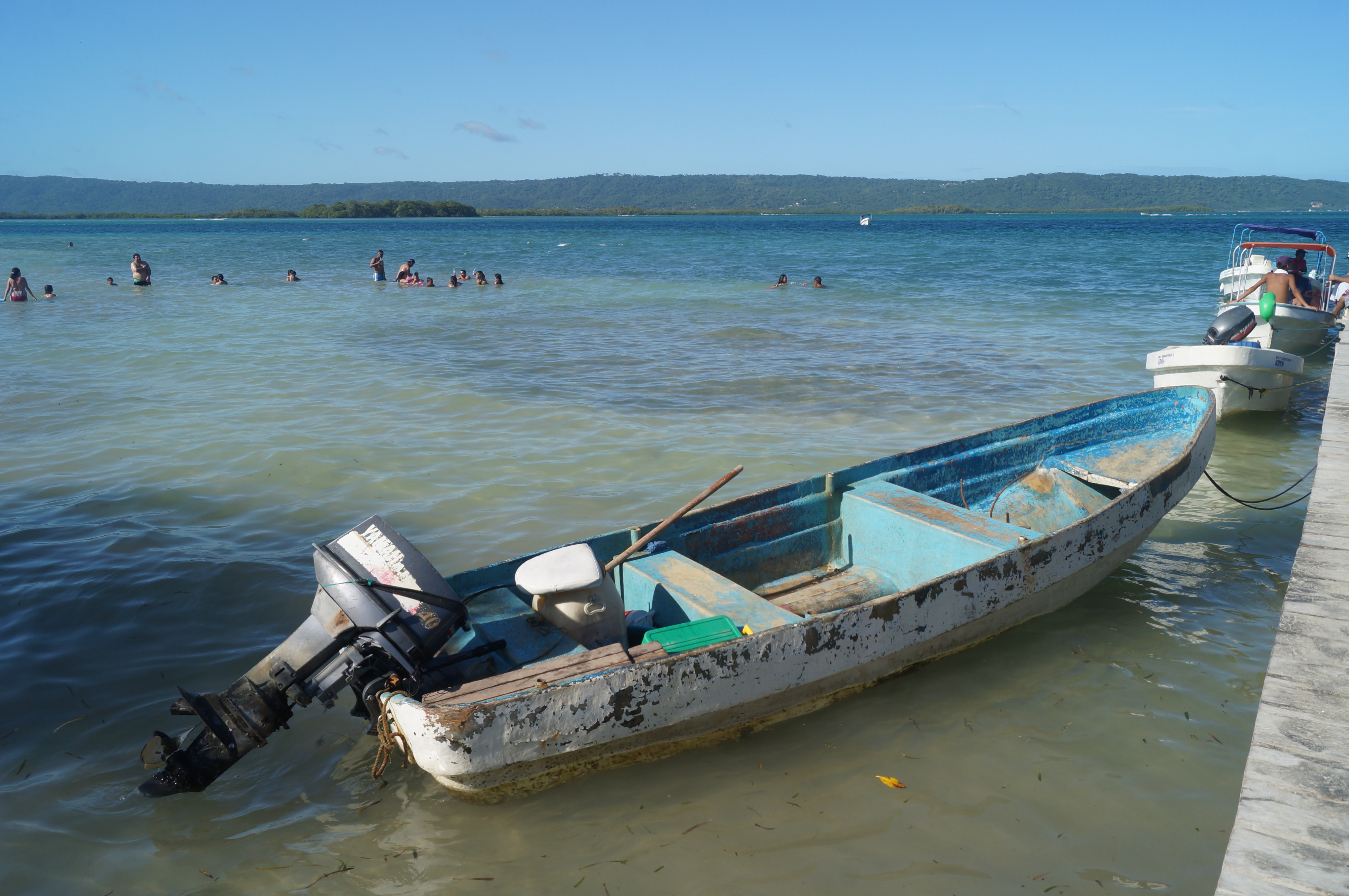 Lancha de motor. Cayo Paiclá. Estado Falcón.